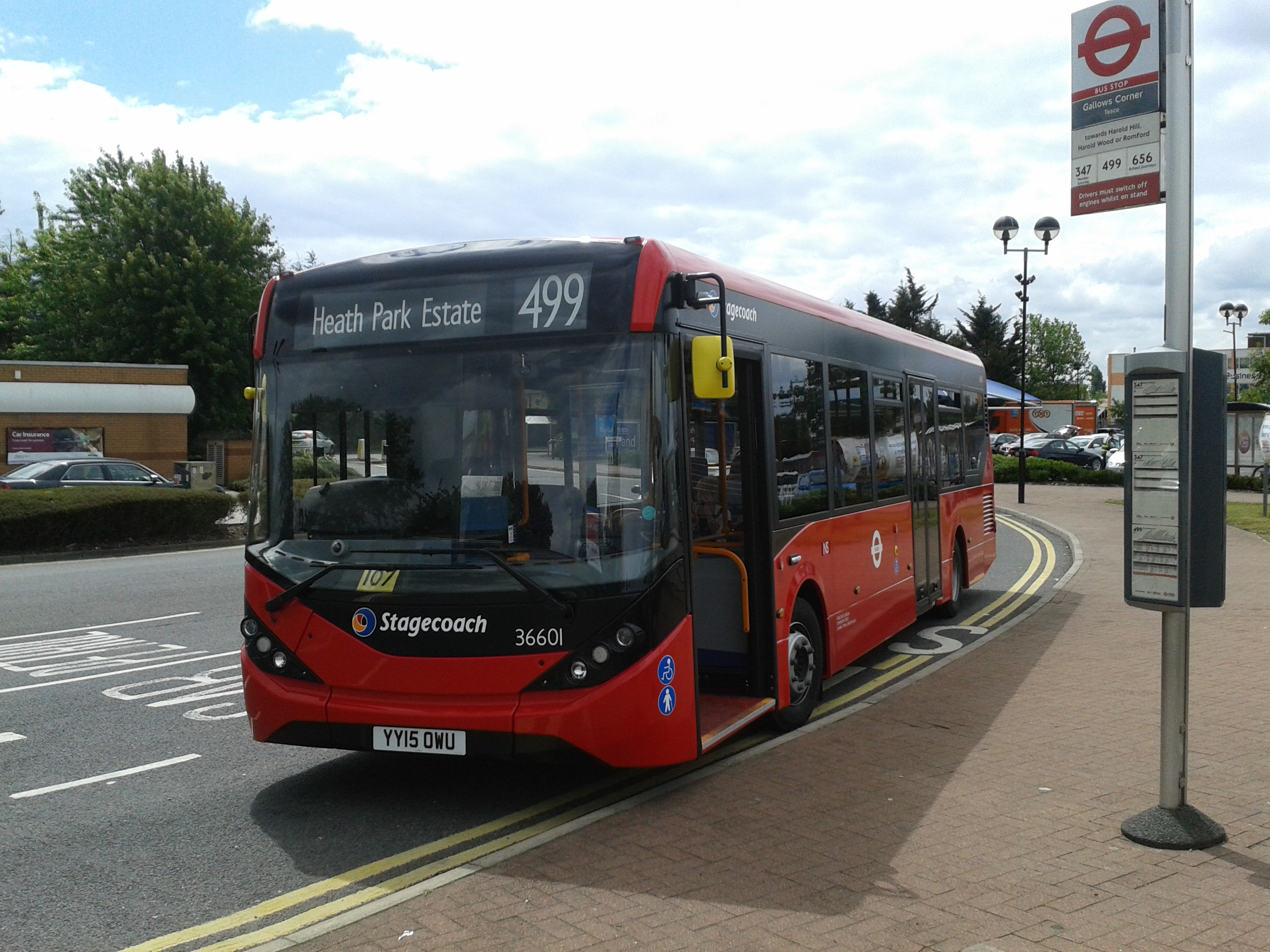 YY15 OWU DSLR Version